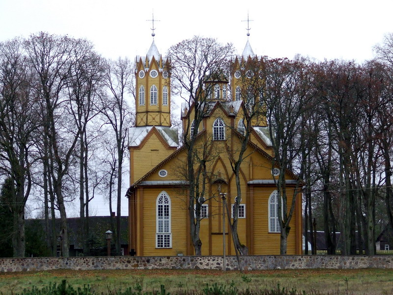 Šv. apaštalų Petro ir Pauliaus church, Nemajūnai, Lithuania.